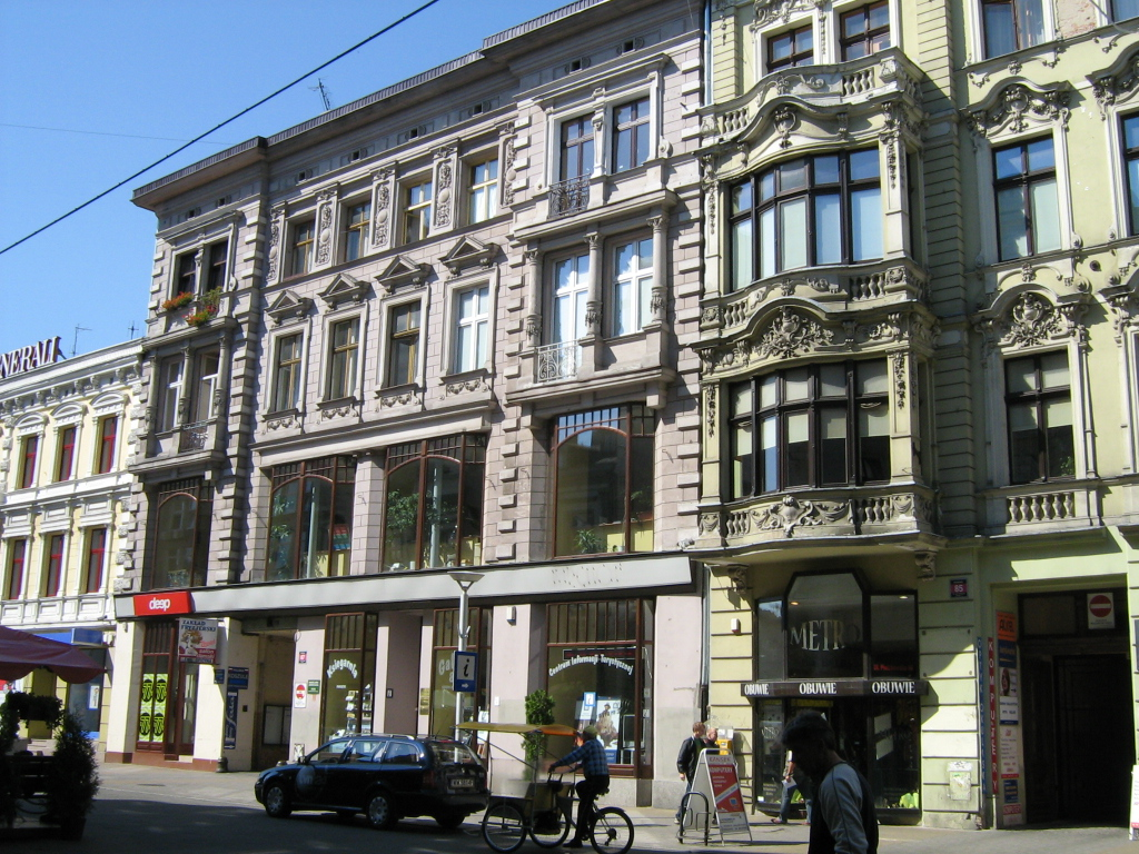 Kamienica Alojzego Balle - Łódź